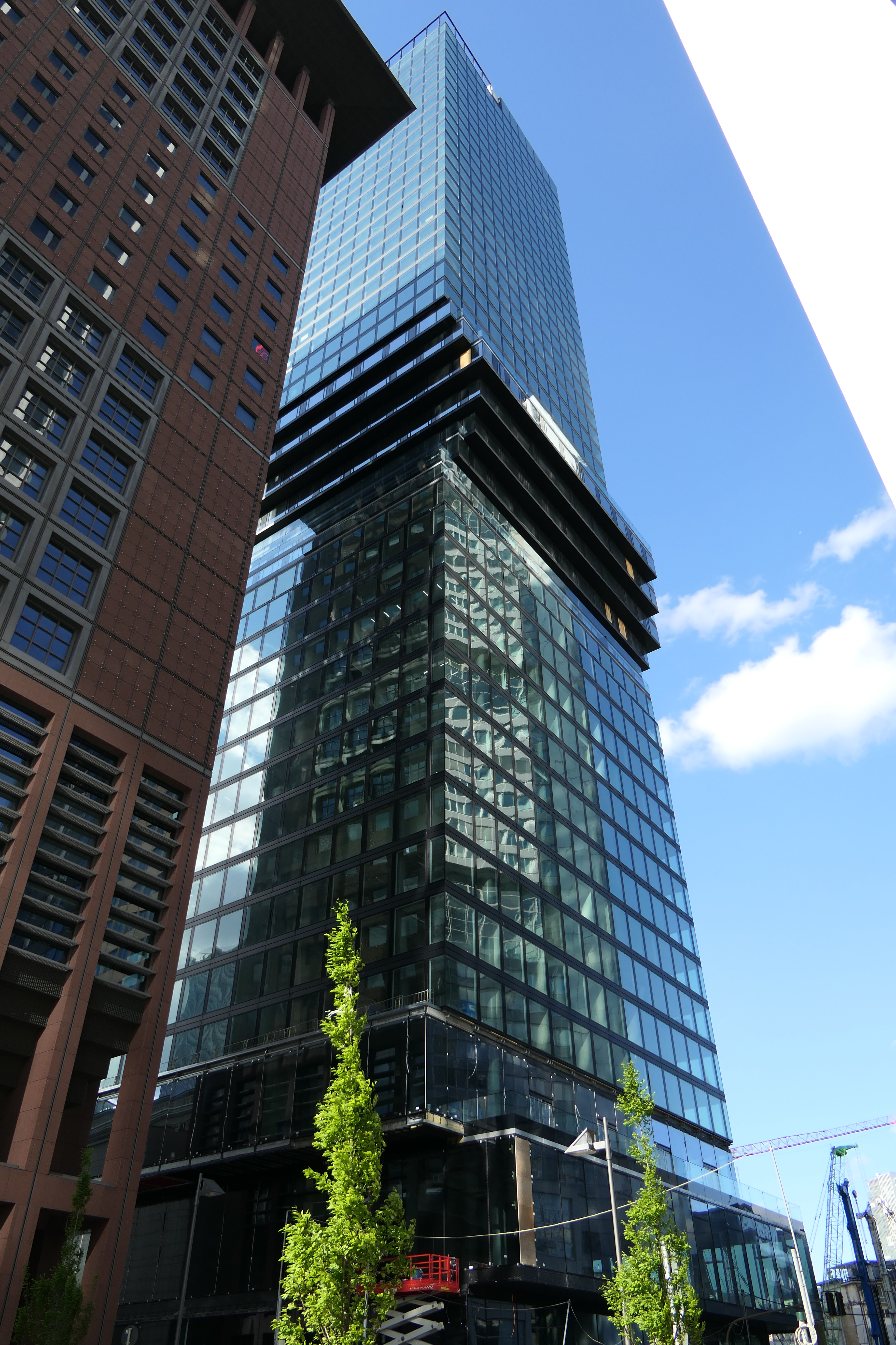 Baufortschritt am Omniturm in Frankfurt im Mai 2019.